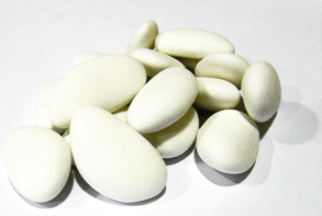 Amande Avolas